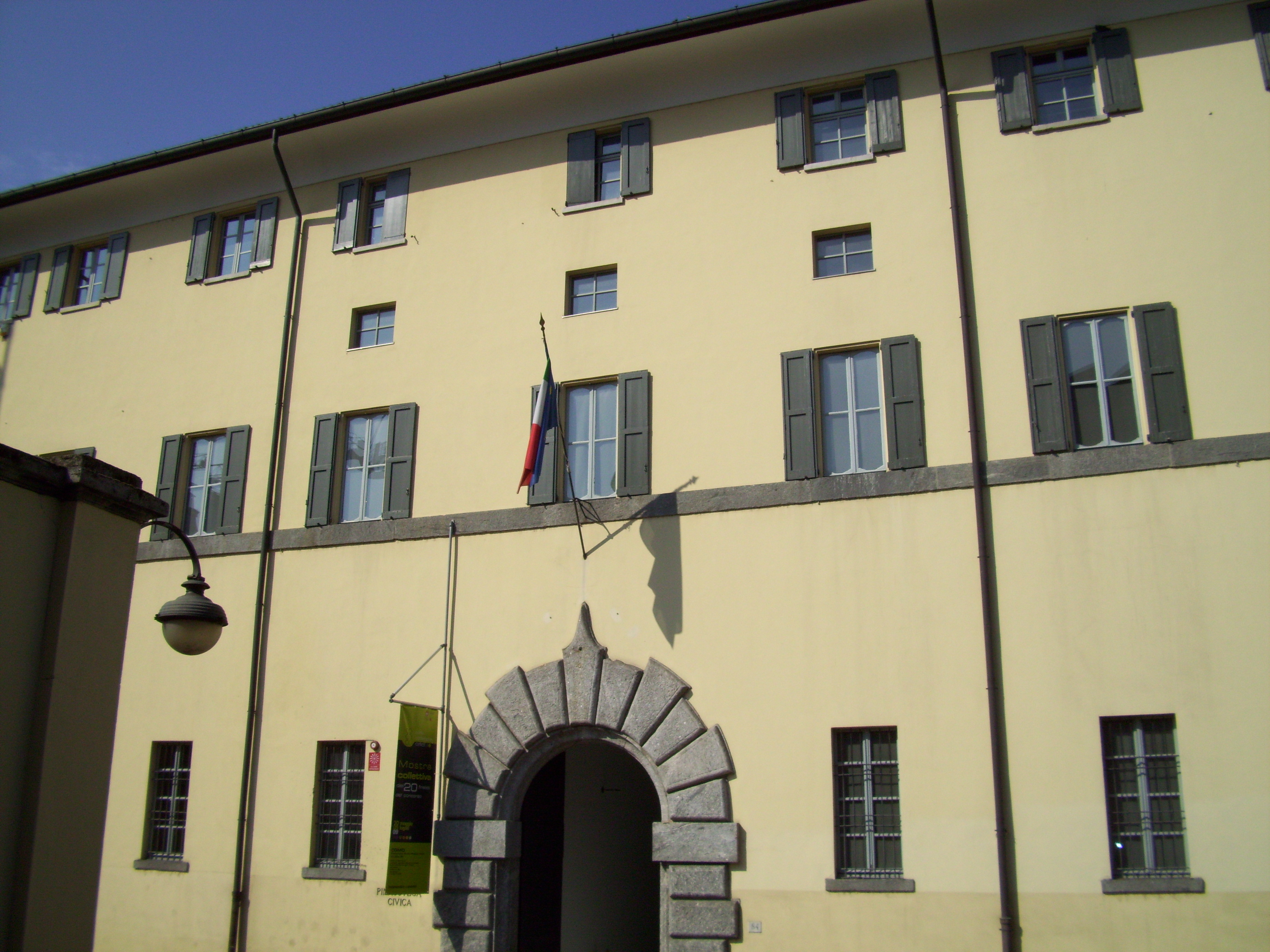 Facciata della Pinacoteca di Como (Palazzo Volpi)